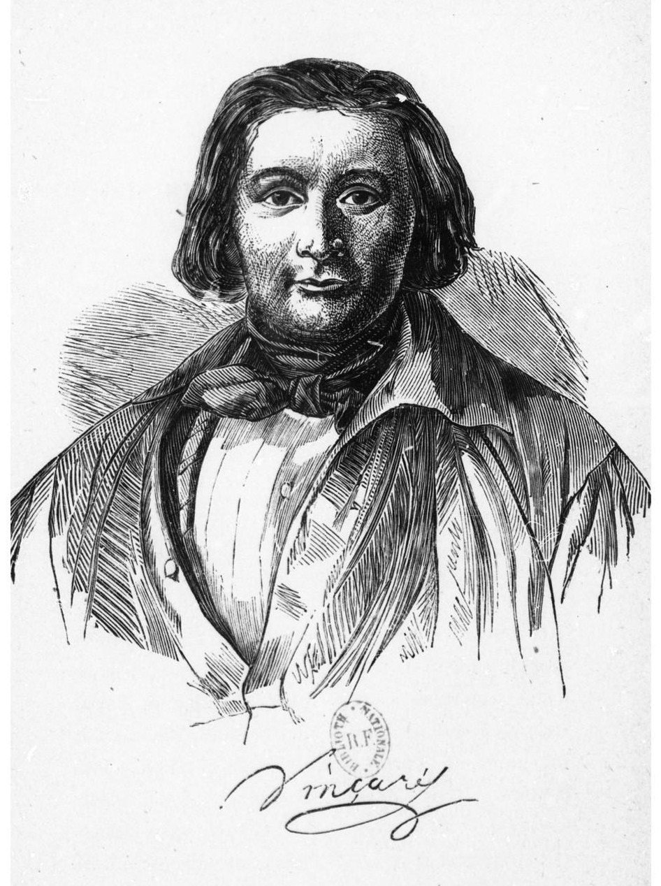 Portrait de Louis Edmé Jean Baptiste Vinçard, dit Jules Vinçard ou Vinçard ainé. Né le 30 juillet 1796 à Paris, mort à une date inconnue, postérieure à 1878 ; artisan, chansonnier, goguettier et propagandiste saint-simonien ; animateur de La Ruche populaire ; a notamment vécu à Saint-Maur-des-Fossés (Seine).